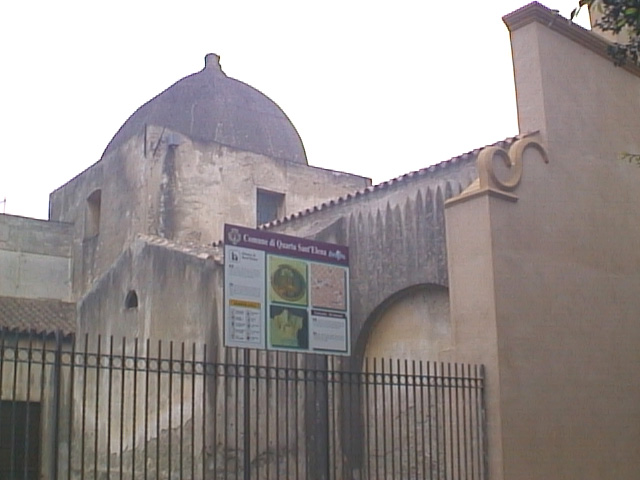 Esterno della chiesa settecentesca di Sant'Efisio a Quartu, particolare della cupola